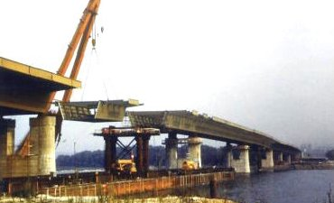 Budapest. Deák Ferenc híd mederhíd építése